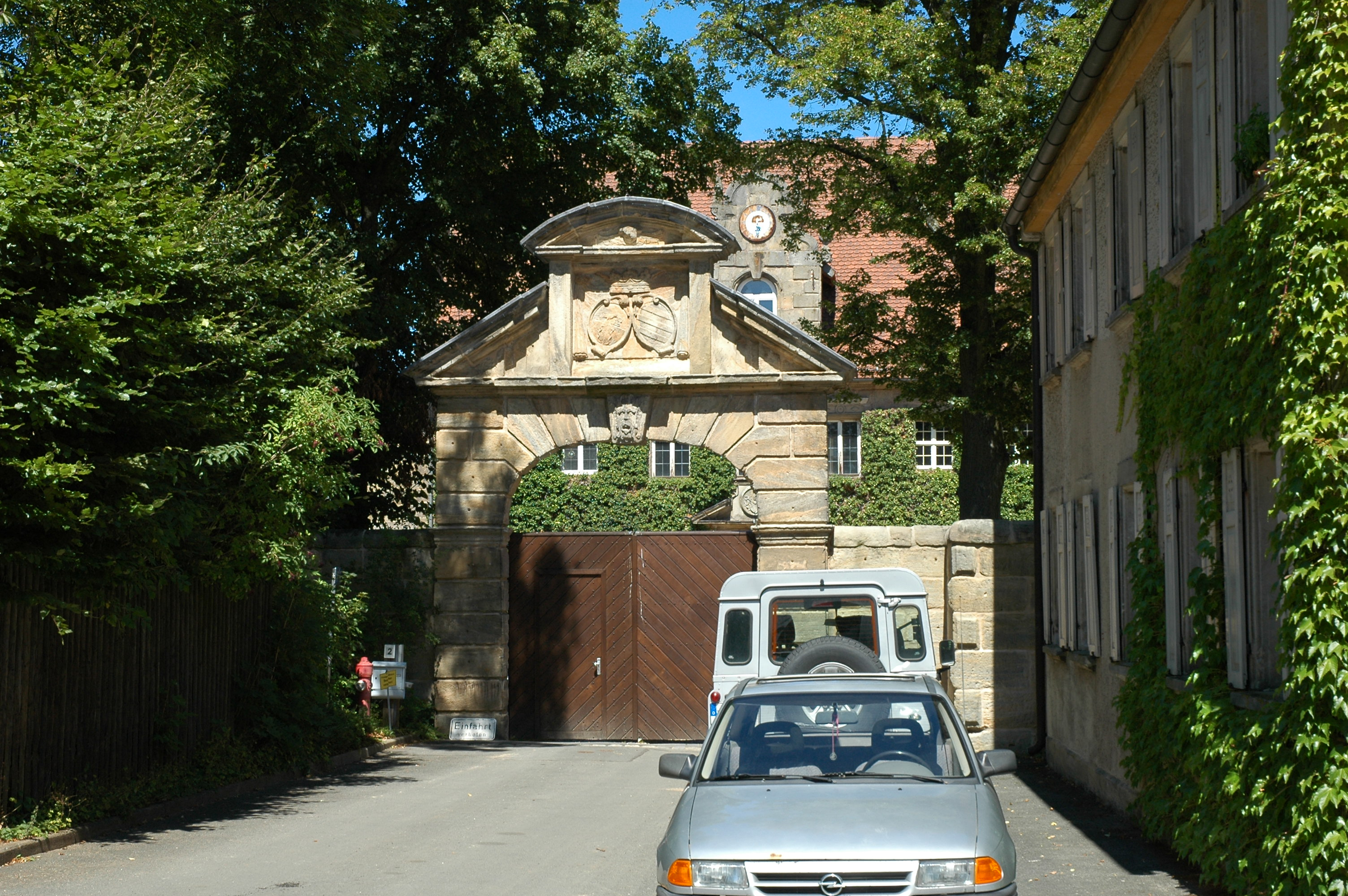 Schloß Rathsberg, Gemeinde Marloffstein, Landkreis Erlangen-Höchstadt; Tor mit Allianzwappen Georg Friedrich Hüls (1676–1744) / Arnoldine von Brand